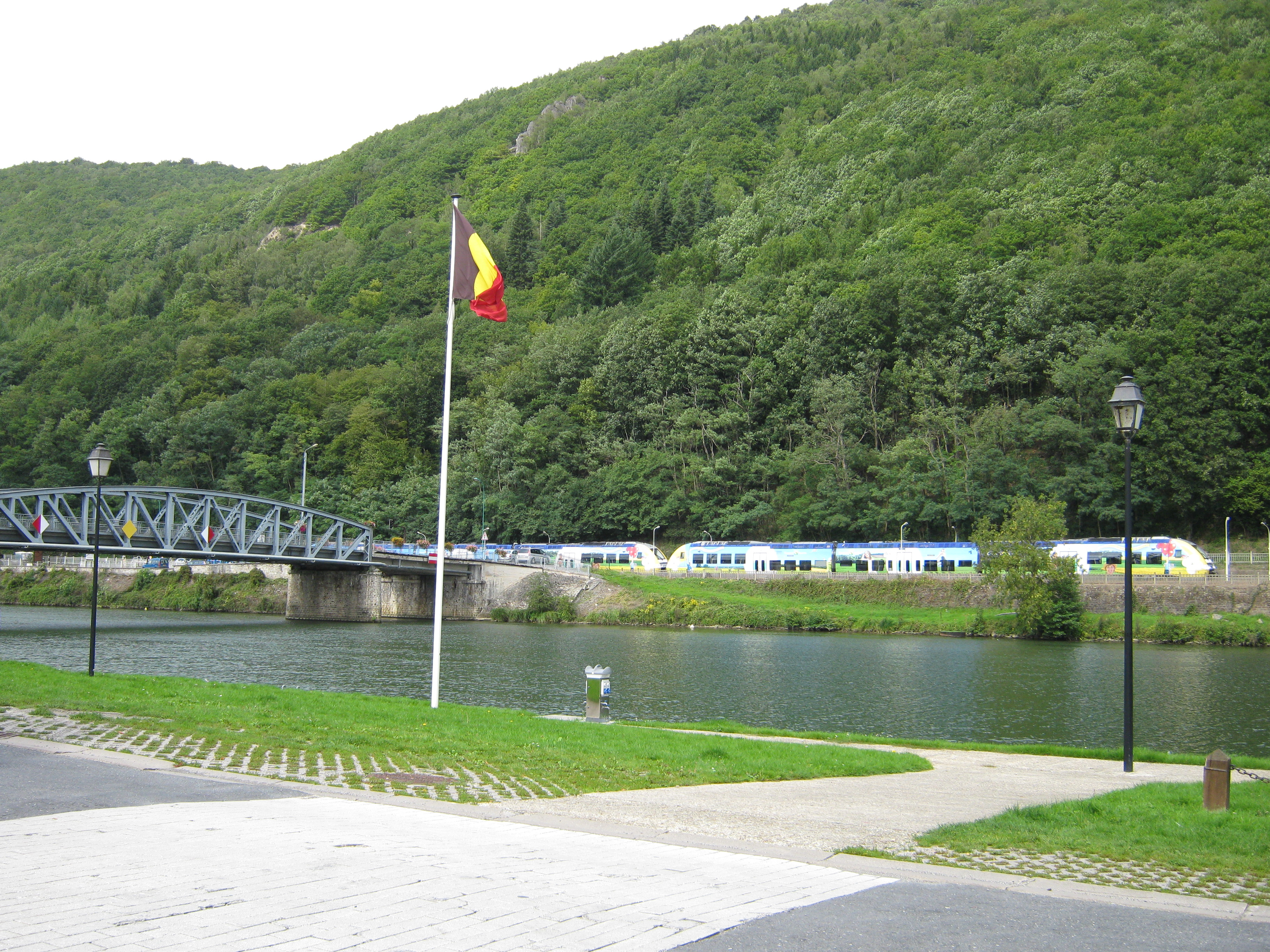 Haybes